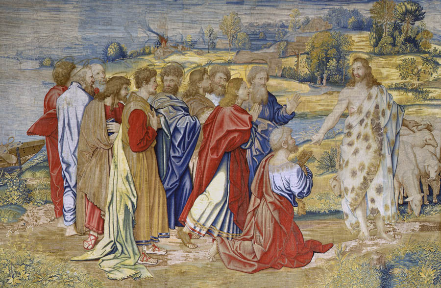 sur un modèle de Rapahel, une tapisserie de Pieter van Aelst faite à Bruxelles. Tapestry Musei Vaticani, Rome